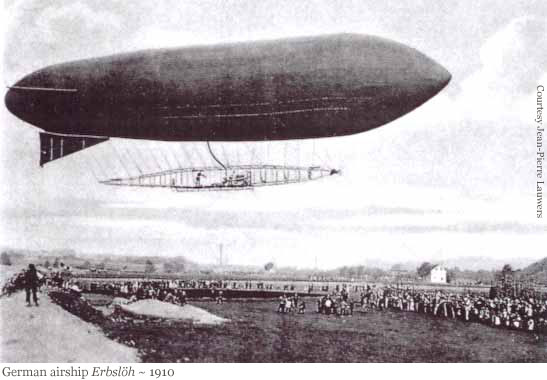 Die Erbslöh war ein nach dem Wuppertaler Luftfahrtpionier Oskar Erbslöh benanntes Luftschiff in den Jahren 1909/10.